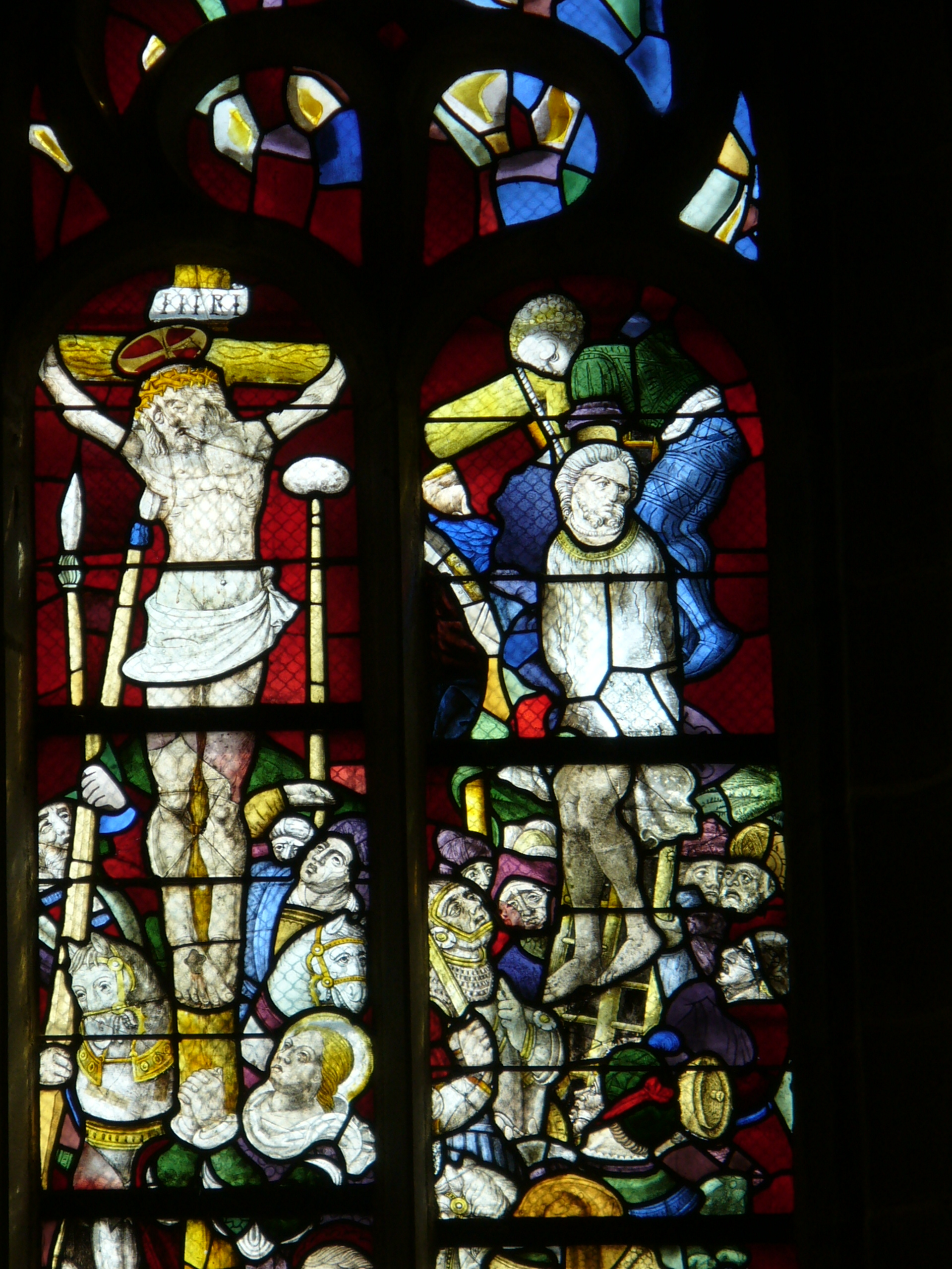 Bunte Bleiglasfenster-Die Bibel in Bildern- Verständlich auch für Die weder Lesen und noch Schreiben könnende Bevölkerung vergangener Zeiten.-Kirchenfenster-Stained glass-Vitrail,Vitraux-Conduzca la ventana de cristal-Vidrio de Color-Vidro manchado-Eglise Saint Miliau-Guimiliau-Enclos Paroissal-Umfriedeter Pfarrbezirk